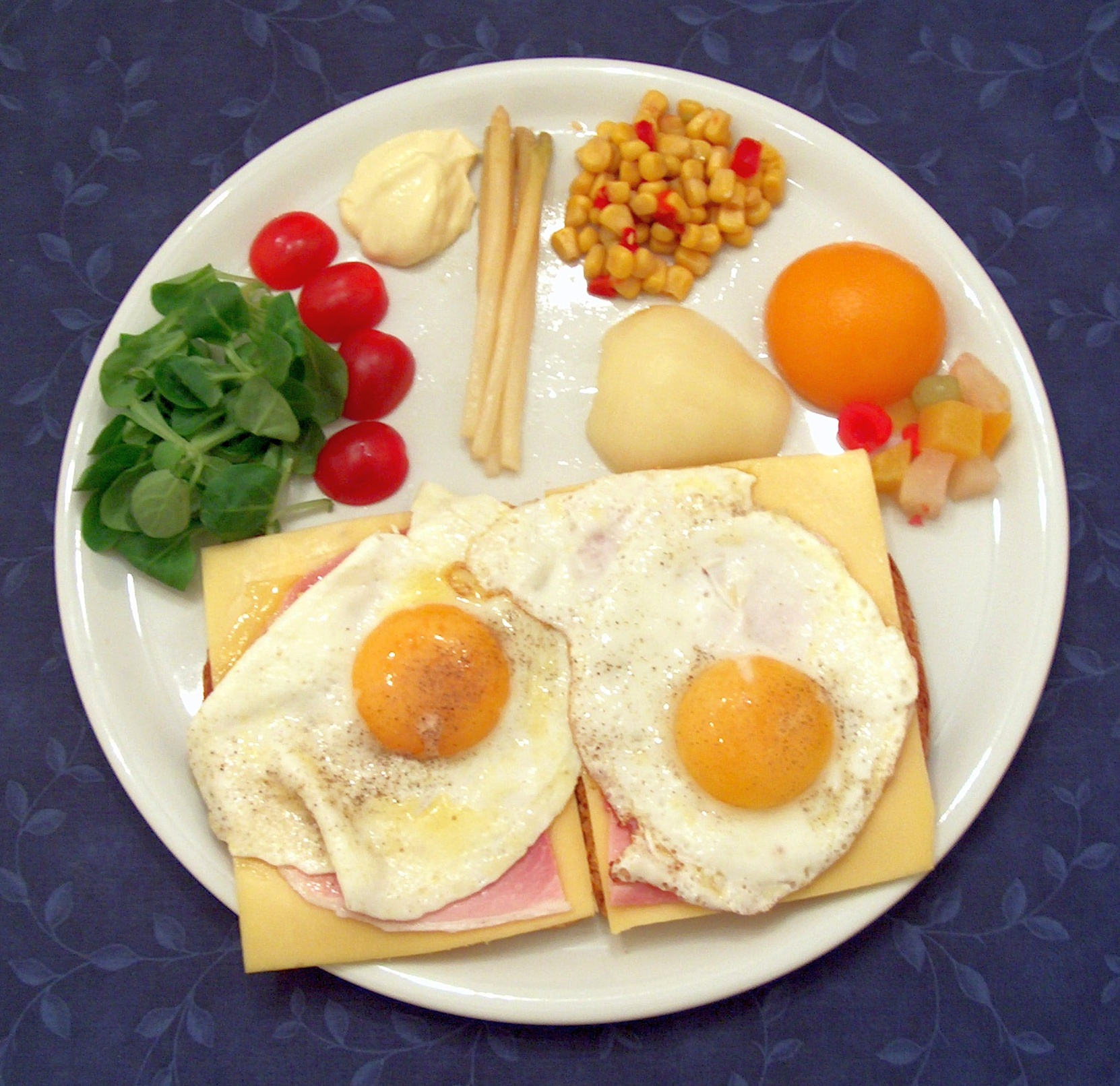 Uitsmijter, Belgique.